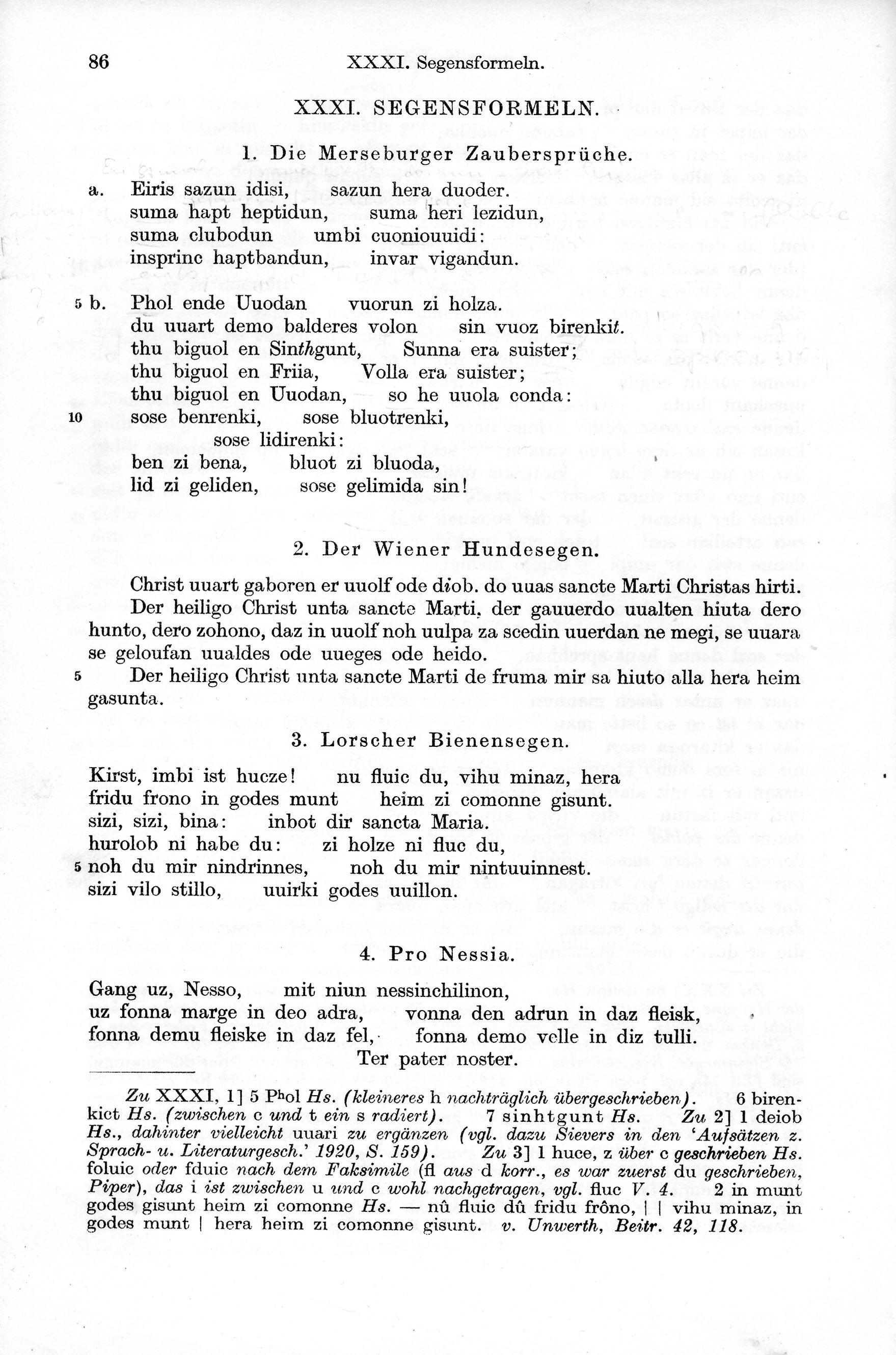 Althochdeutsche Zaubersprüche 01